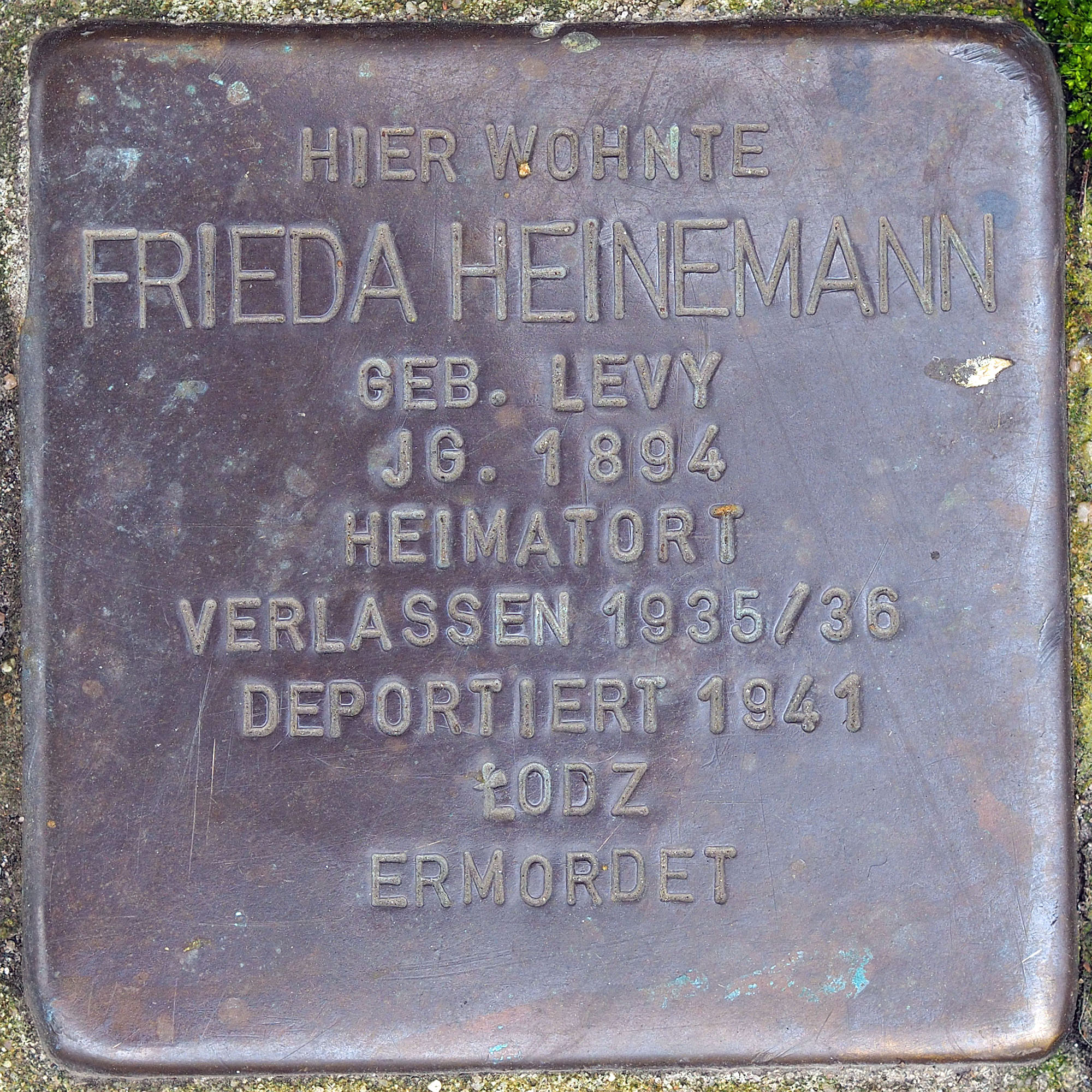 Stolpersteine GV: Heinemann, Frieda